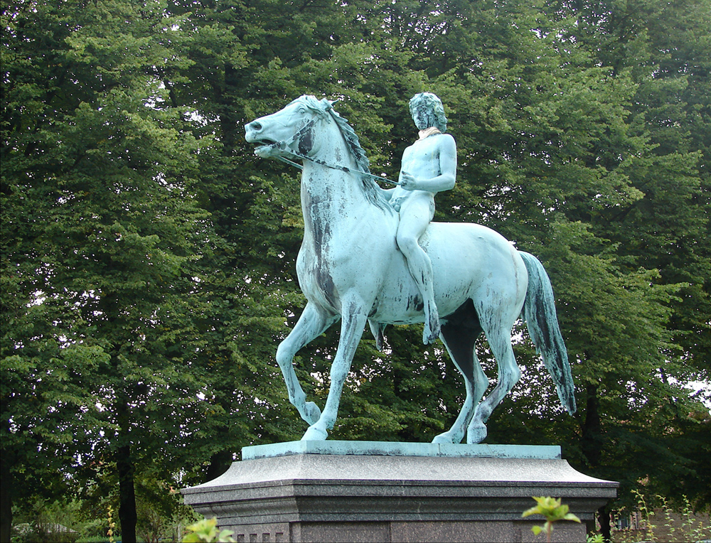 Vilhelm Bissen, Yngling til hest, København